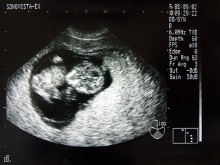 Sonographie eines Neunwöchigen Fötus